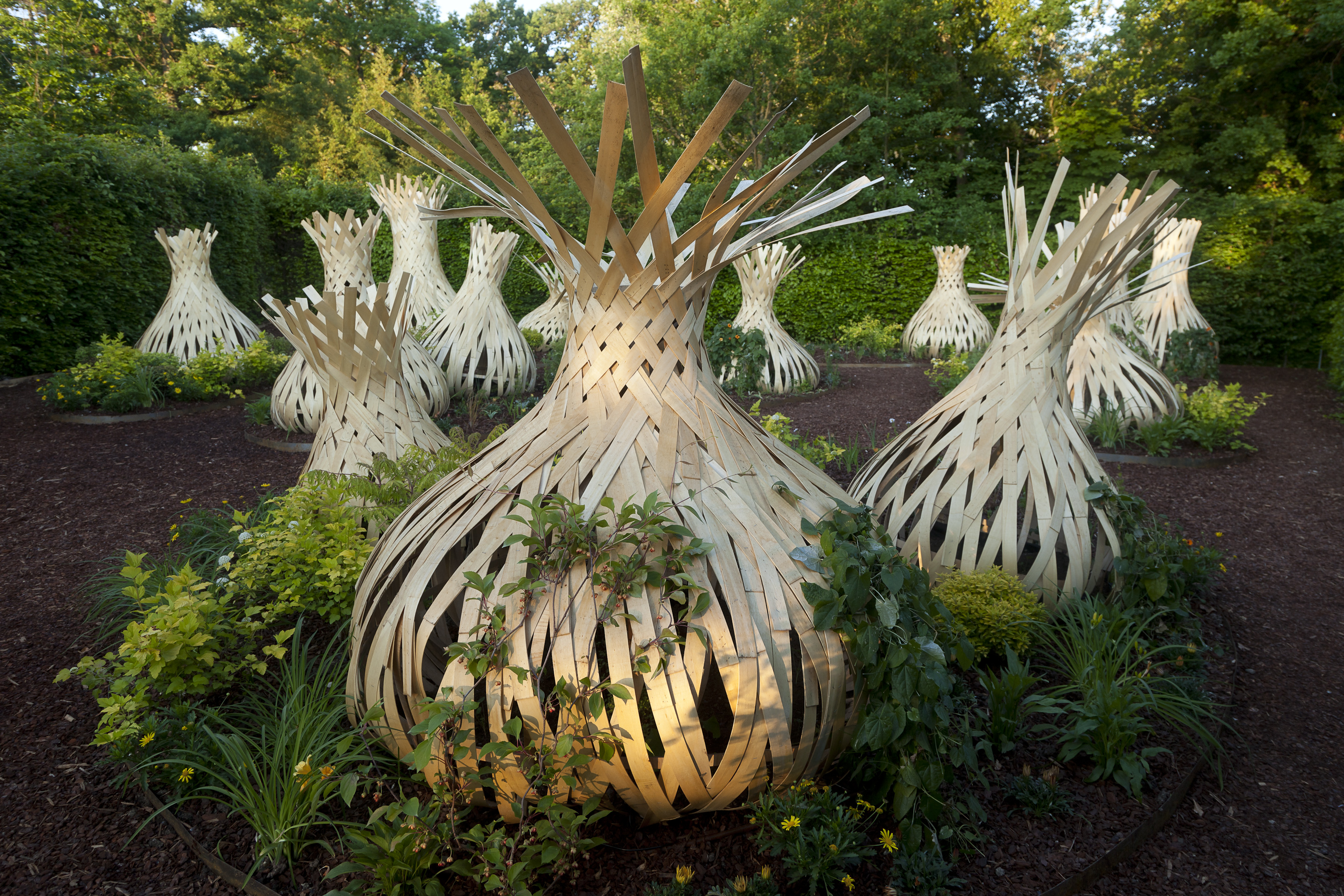 Jardin 17. Les bulbes fertiles